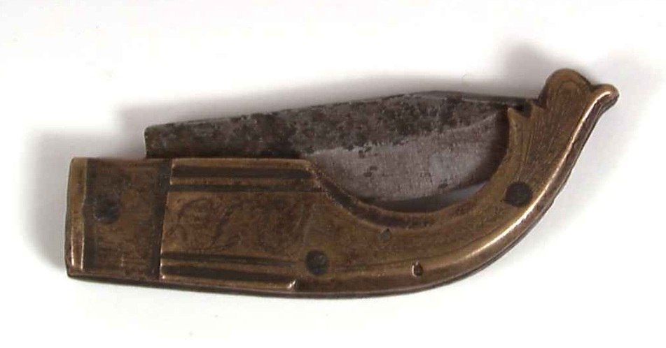 Foldekniv fra Ål i Hallingdal, datert 1850, med blad av jern og skaft av messing. Foto: Anne-Lise Reinsfelt / Norsk Folkemuseum, NF.1944-0238